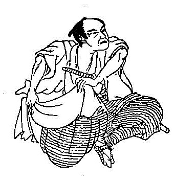 轟武兵衛